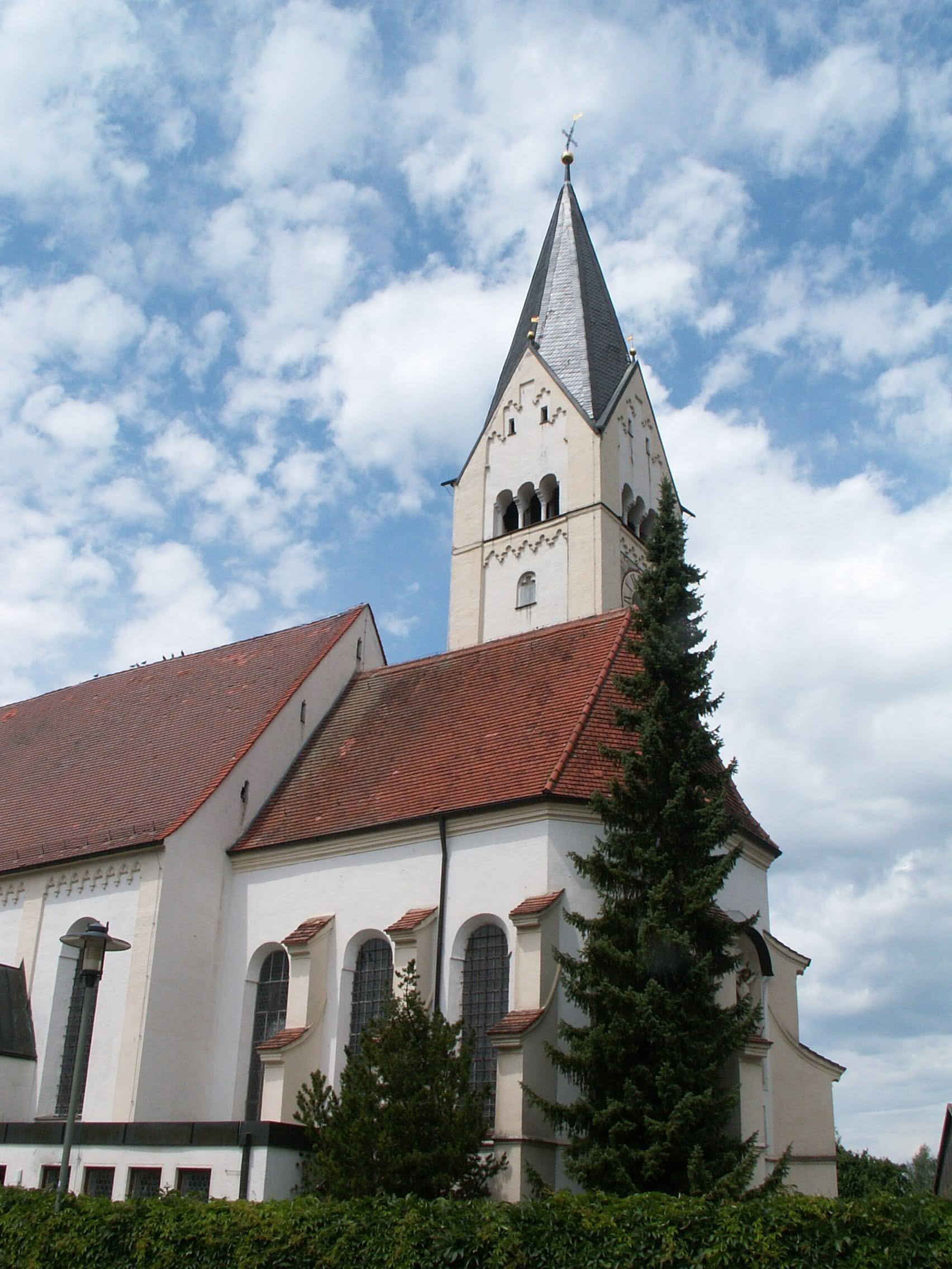 Pfarrkirche in Jengen